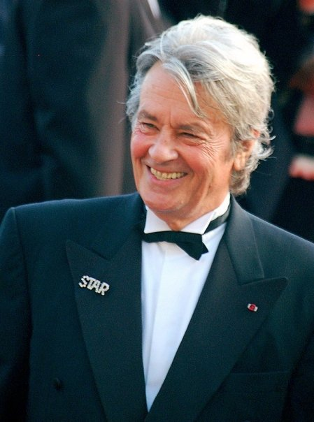 Alain Delon au festival de Cannes